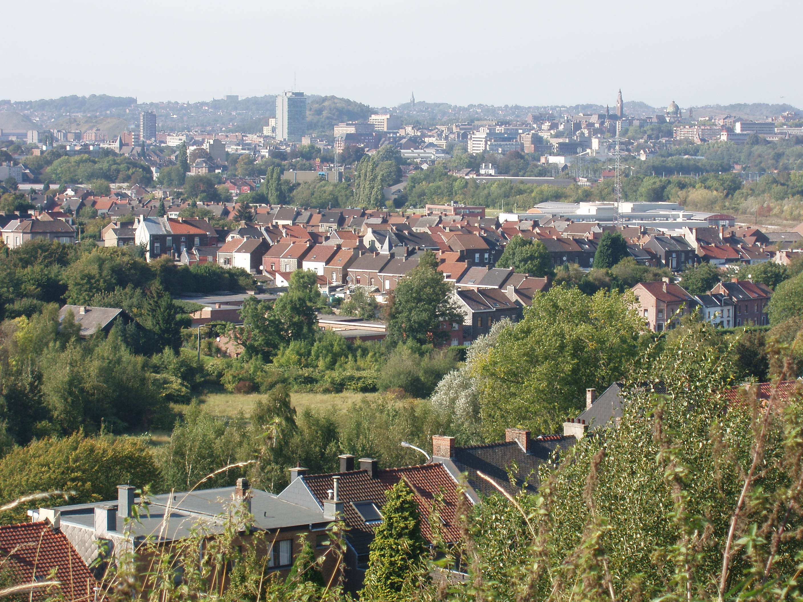 pnoram de charleroi vu depuis Couillet